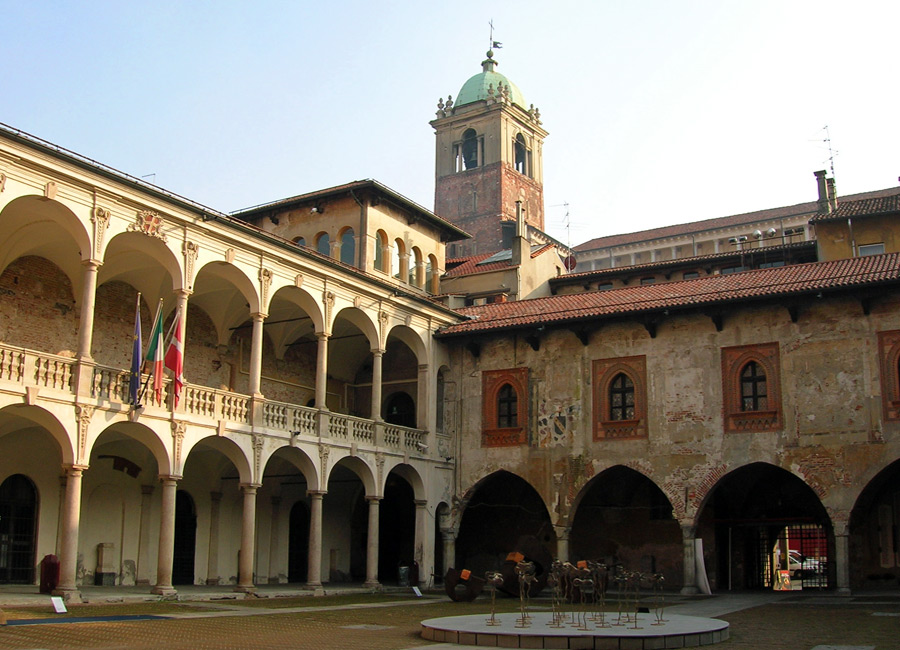 Scorcio dell'Arengo del Broletto a Novara: sulla sinistra il Palazzo dei Paratici con la loggia settecentesca, a destra il Palazzo del Podestà; alle spalle il campanile del duomo.